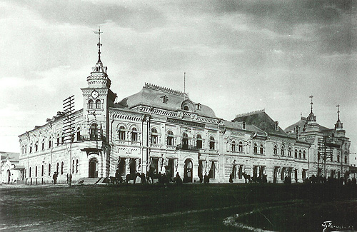 Kunst&Albers in Blagoweschensk